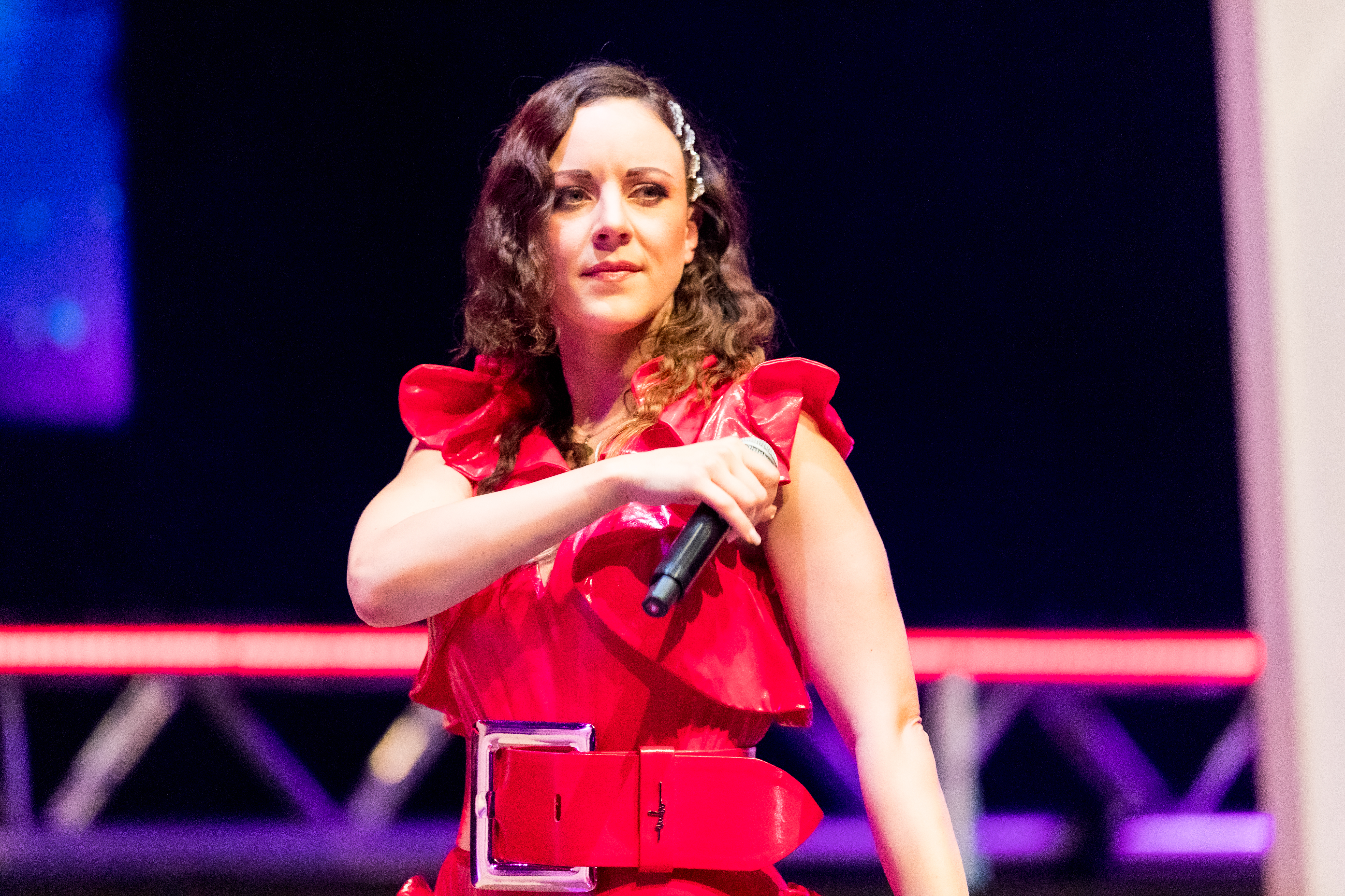 Blümchen during Sunshine Live - Die 90er Live on Stage at Maimarkthalle & Maimarktclub, Mannheim, Baden-Württemberg, Germany on 2019-12-01, Photo: Sven Mandel